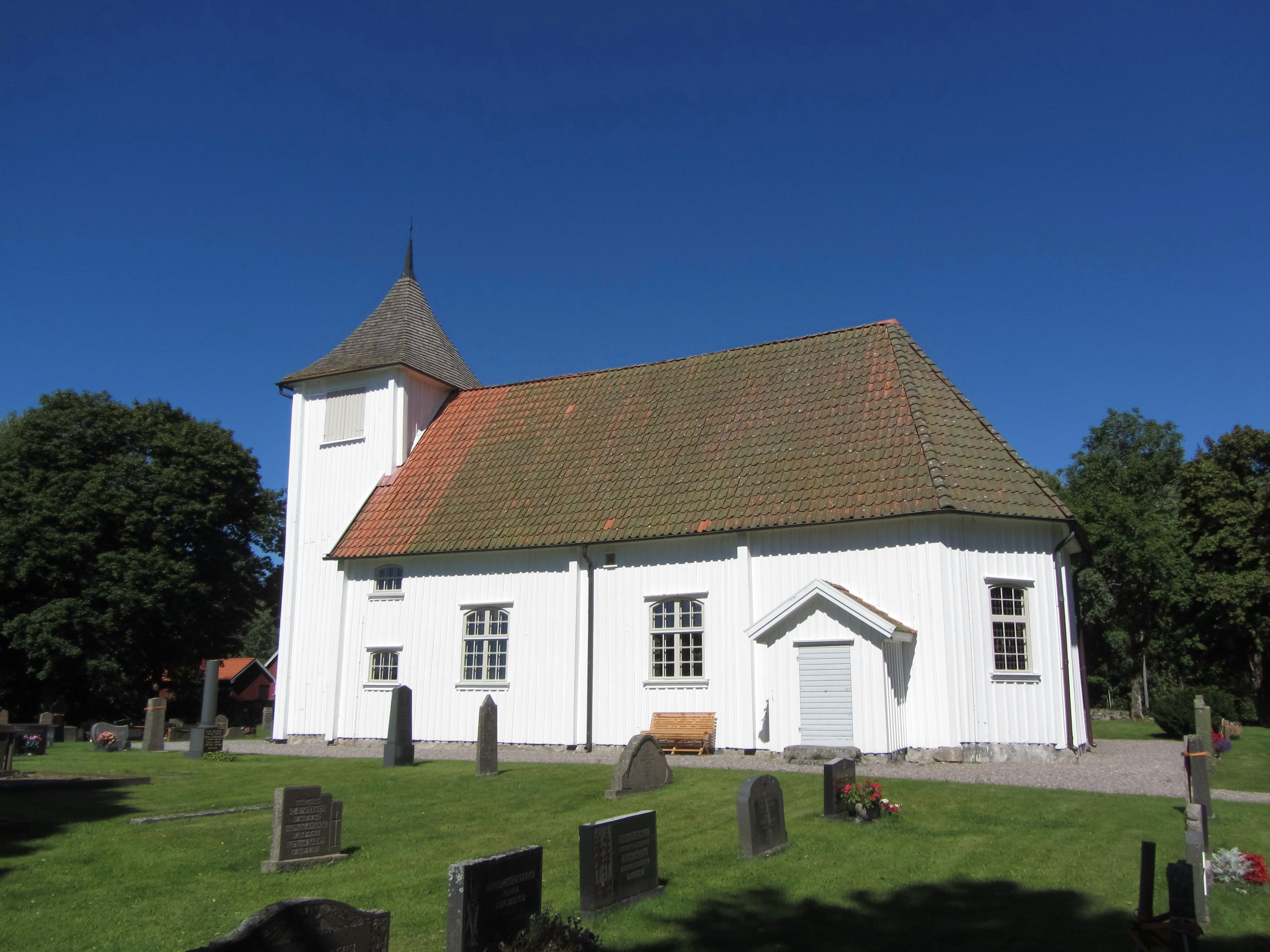 Råggärds kyrka i Dalsland.